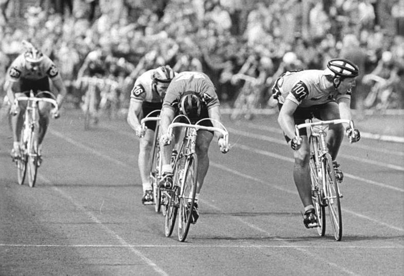 Pardubice, Friedensfahrt, Endspurt ADN-ZB Kasper 15.5.87 ma-CSSR: 40. Internationale Friedensfahrt-7. Etappe vonPrag nach Pardubice über 148 km- Erst auf der Aschenbahn des Ruda-Hvezda-Stadions von Pardubice wurde die Etappe entschieden. 100-km-Mannschafts-Weltmeister Tom Cordes (Niederlande-rechts) stürmte als Erster ins Stadion, doch reichten ihm drei Radlängen Vorsprung nicht zum Sieg. Der schnelle Dshamolidin Abdushaparow (UdSSR-Mitte) nutzte die Gunst der Stunde und überspurtete ihn. Dahinter der Drittplazierte Zdzislaw Wrona (Polen).